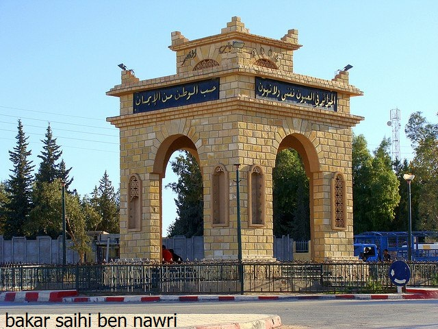 باب القصر قصر الحيران bab l'ksar ksar el hirane